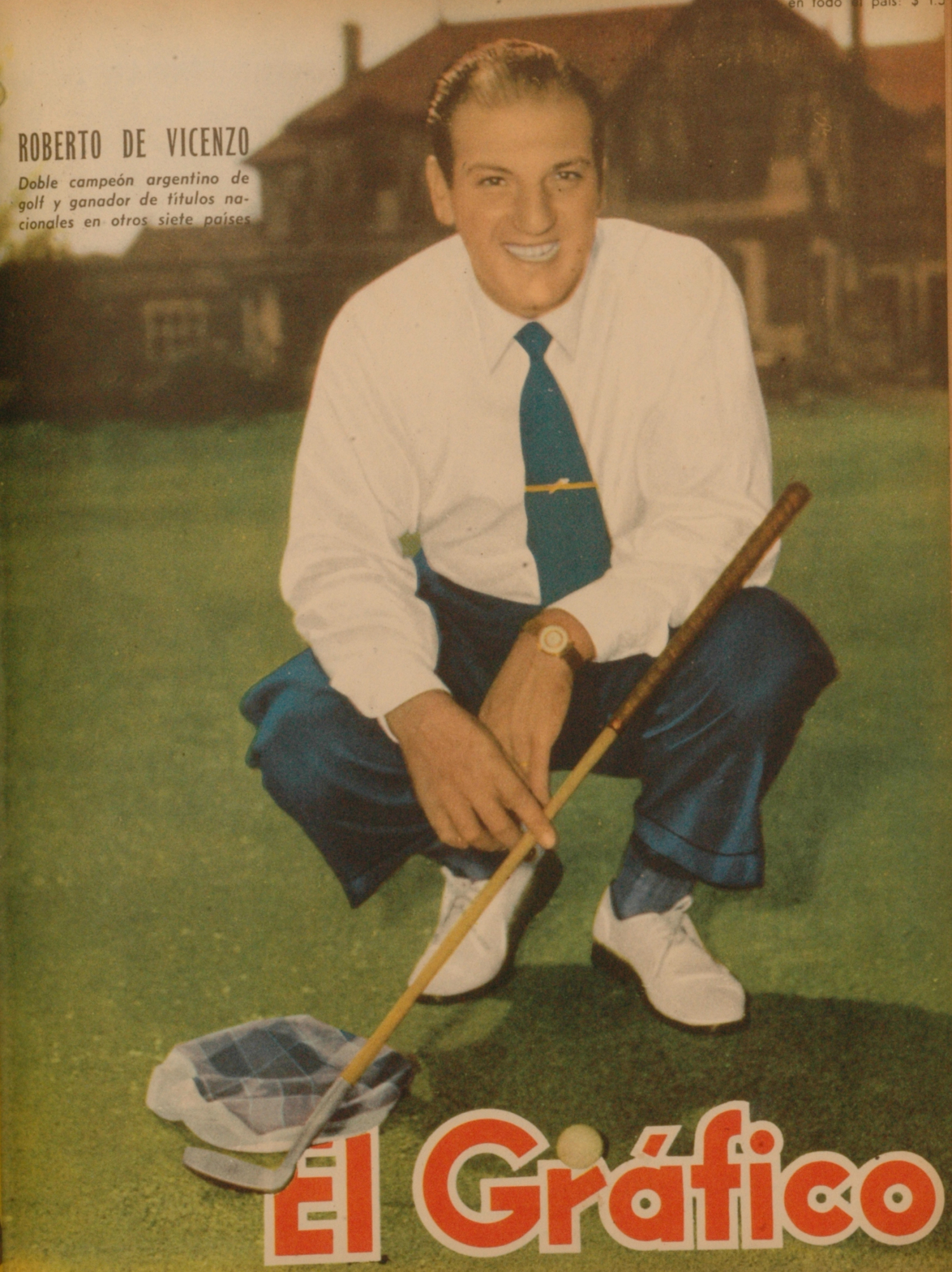 El Grafico del 14 de Marzo de 1952. Edicion 1701